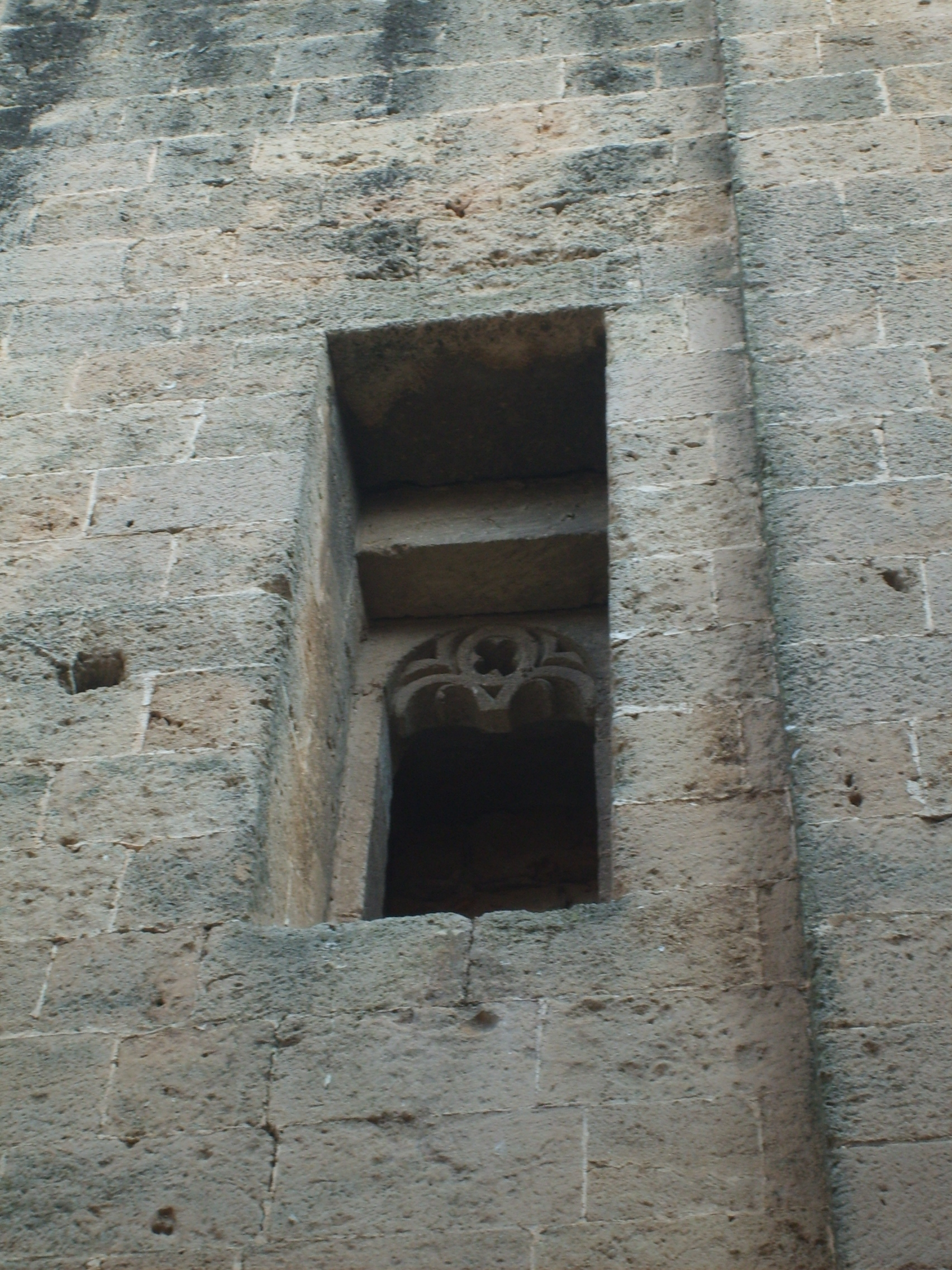 Monofora della Chiesa Matrice